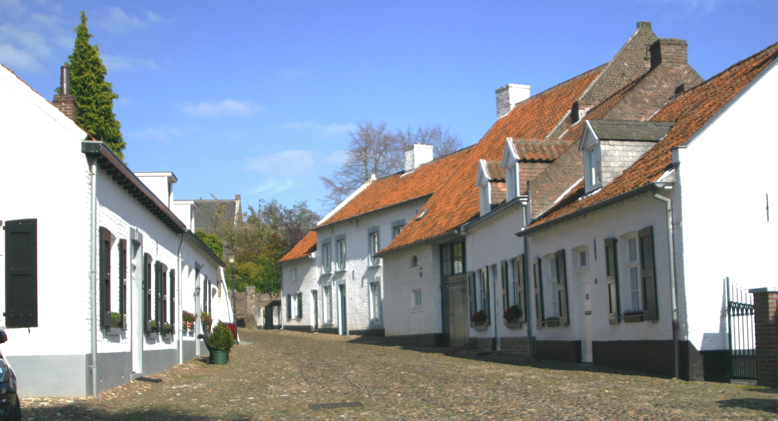 Wäiss Haiser an der Beekstraat zu Thorn, vun der Brigade Piron-Bréck aus gesinn. Kategorie:Uertschaften an der Provënz Limburg